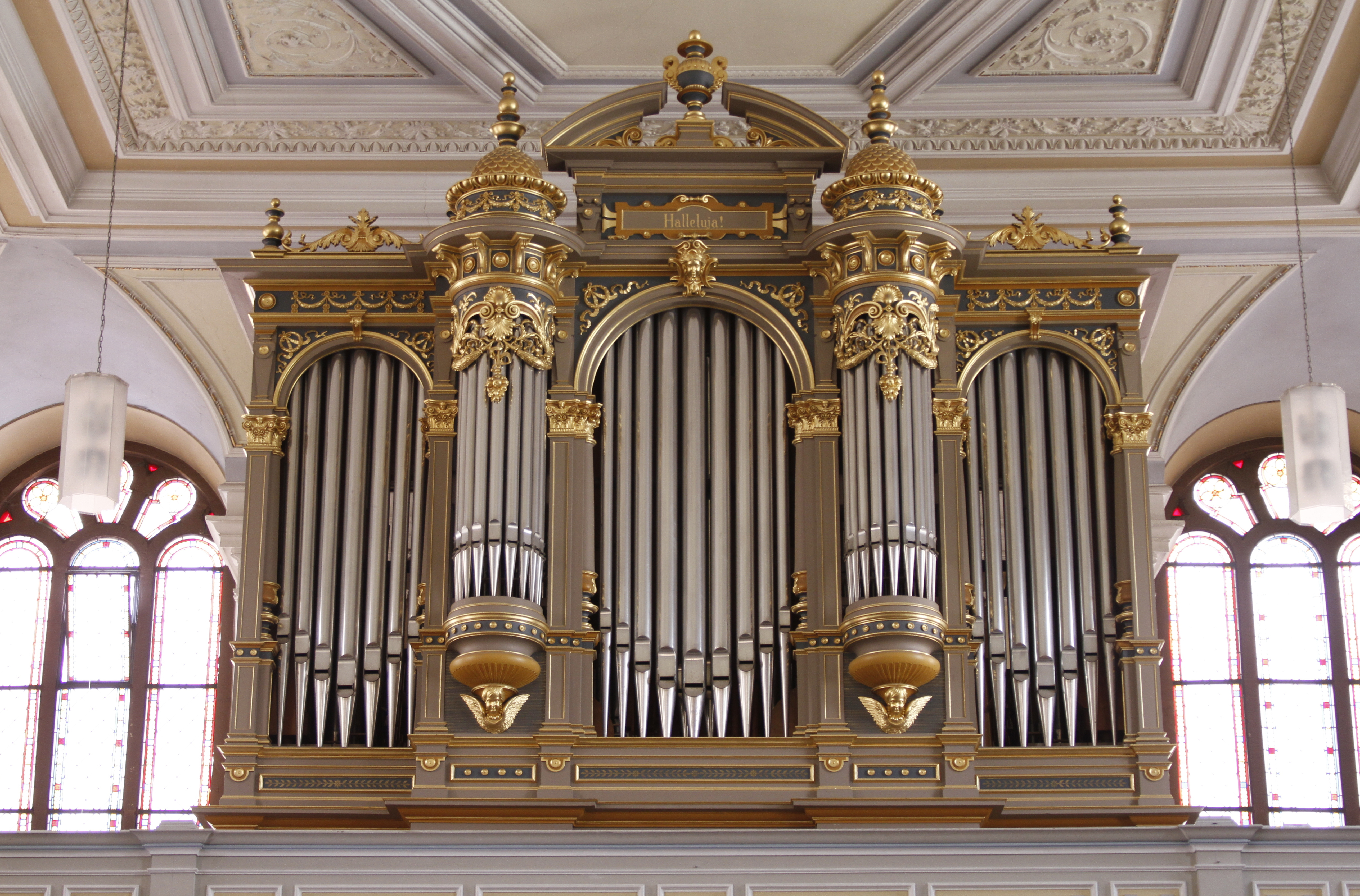 Providenzkirche - Heidelberg - Germany